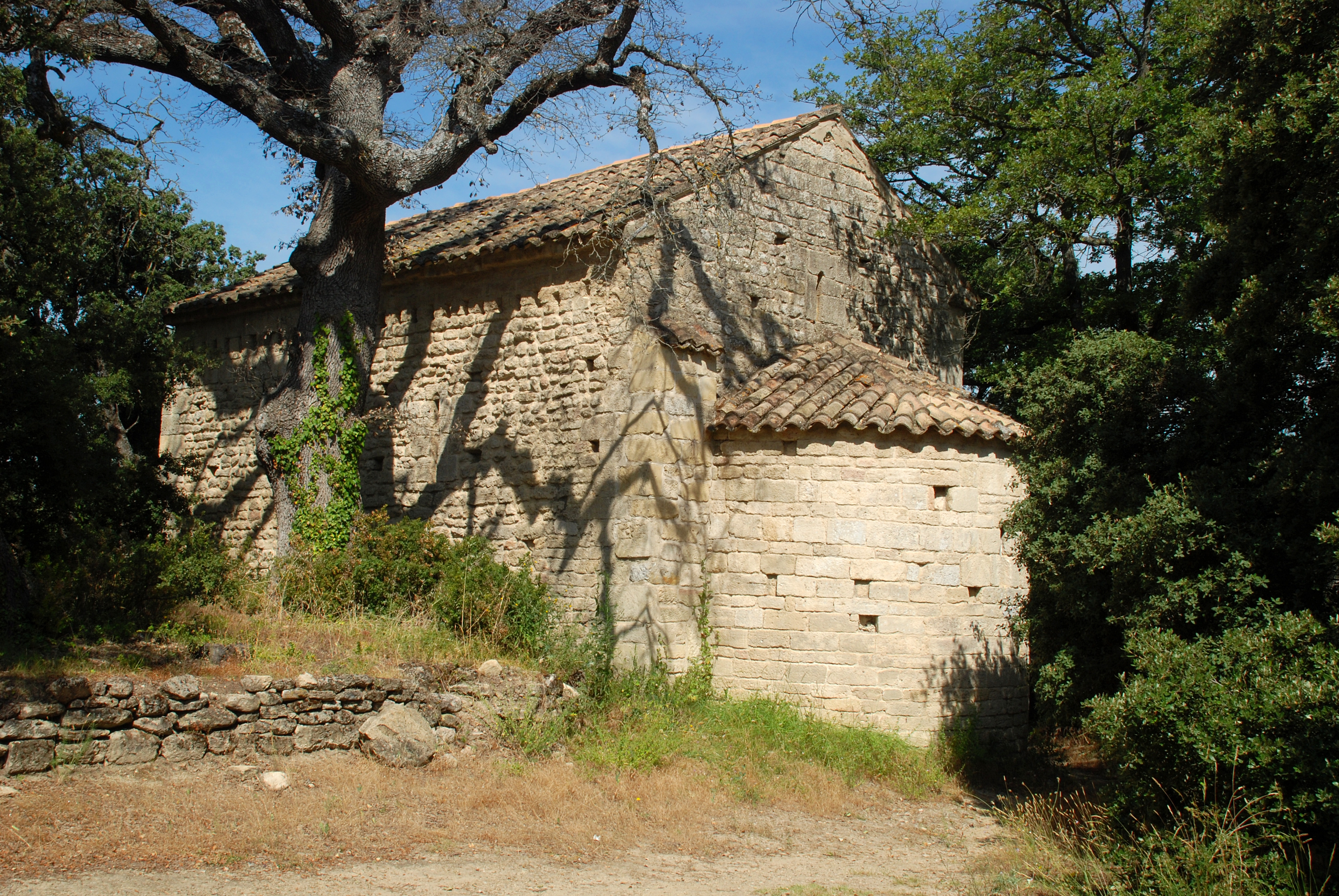 France - Provence - Bouches-du-Rhône - Aurons - Chapelle Saint-Martin-du-Sonnailler